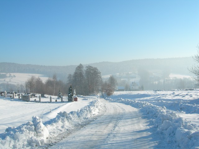 Kornatka zimą. Autor- Łukasz Międzik.